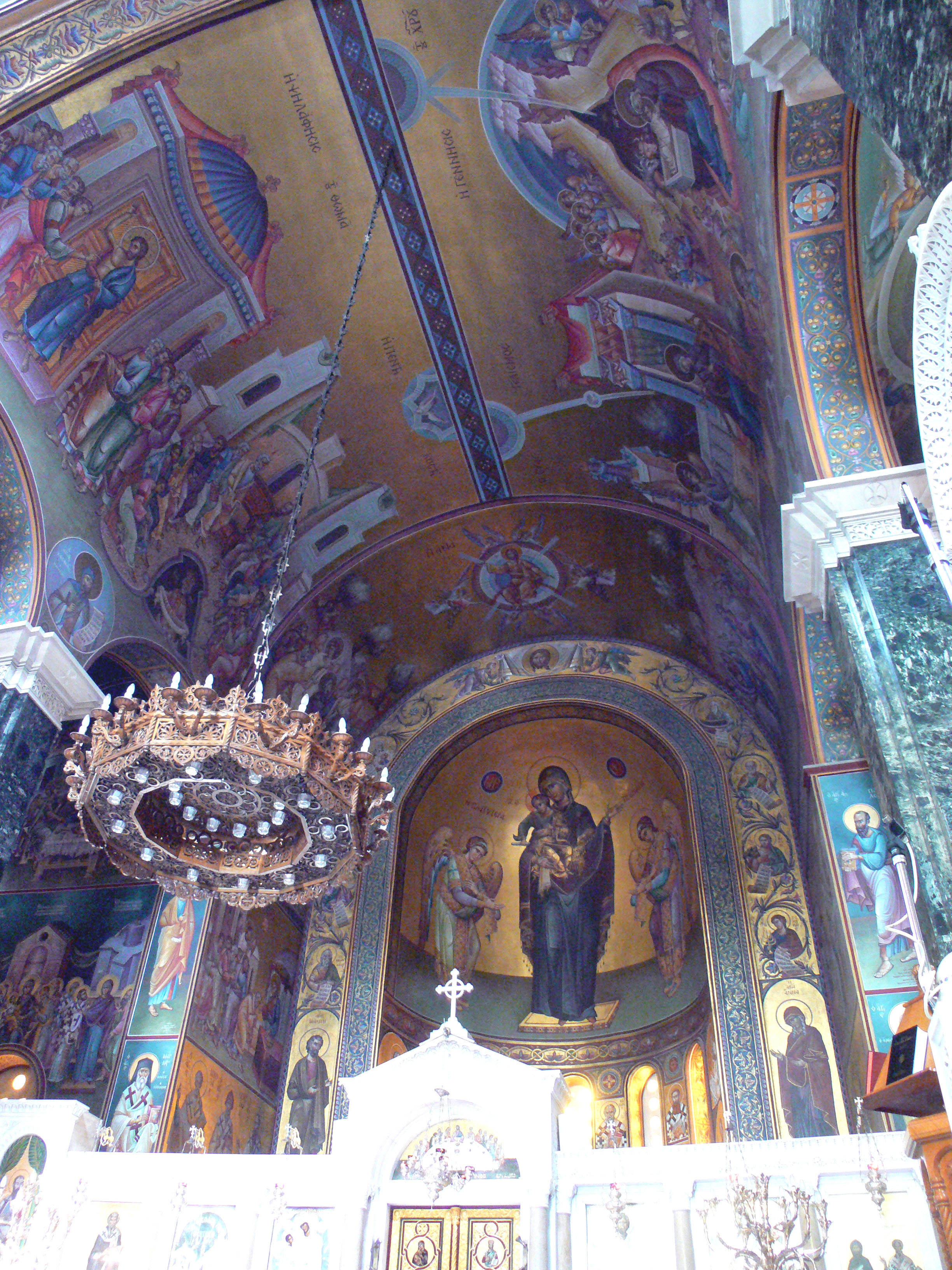 Thessaloniki. Verklärungs-Kirche